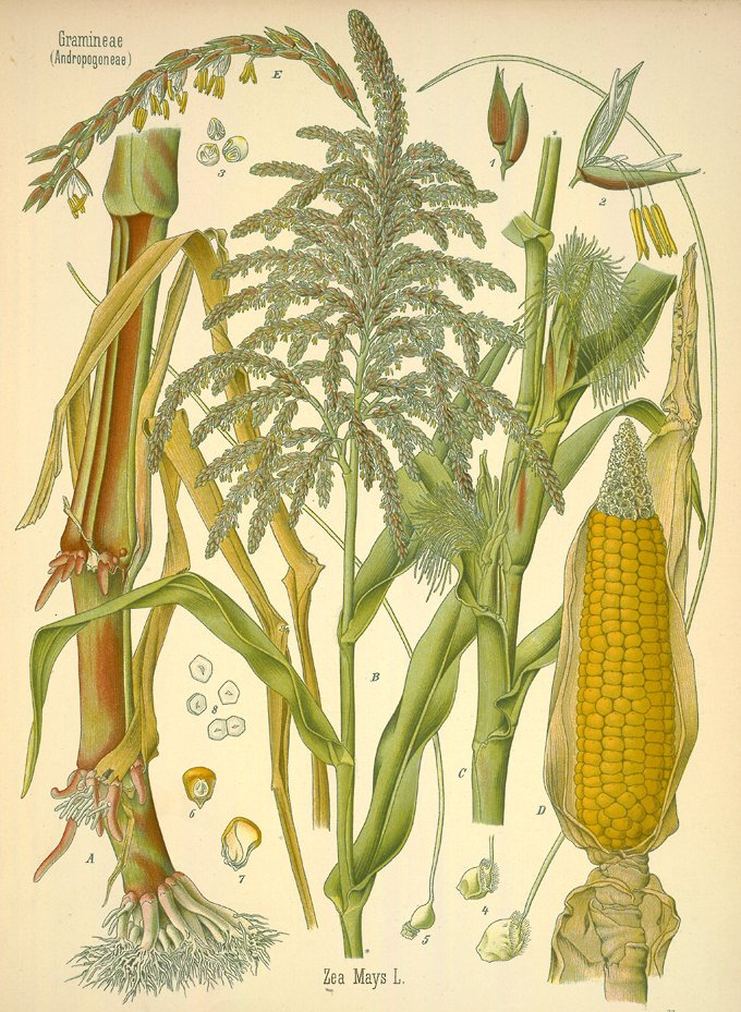 Zea mays.